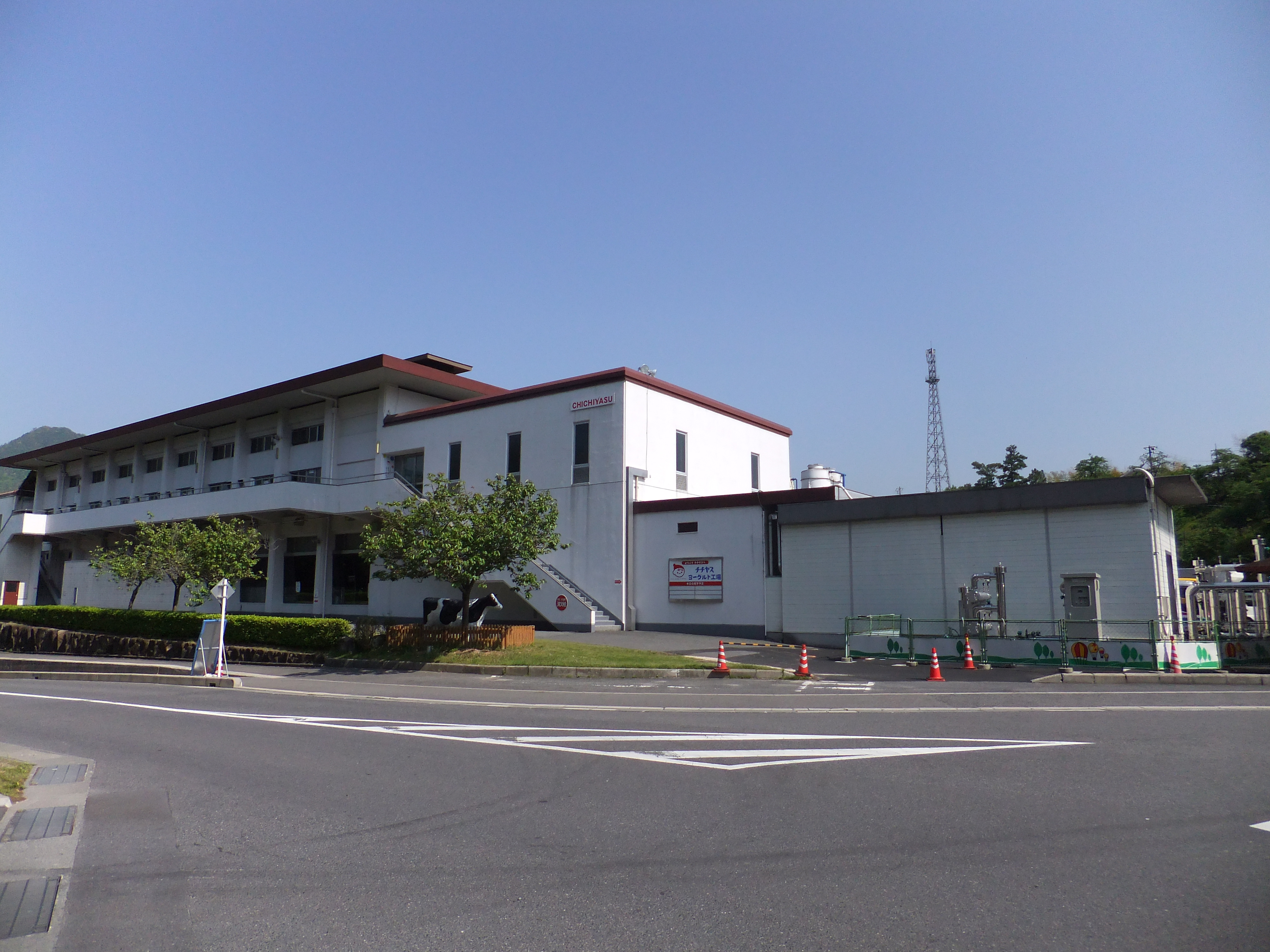 チチヤス本社